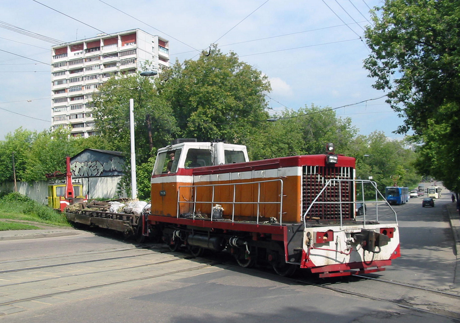 Маневровый тепловоз ТГМ40-0386 на ветке Черкизово - Электрозавод.